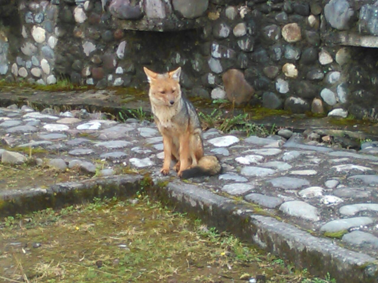 Zorro (Reserva Ecológica El Ángel)